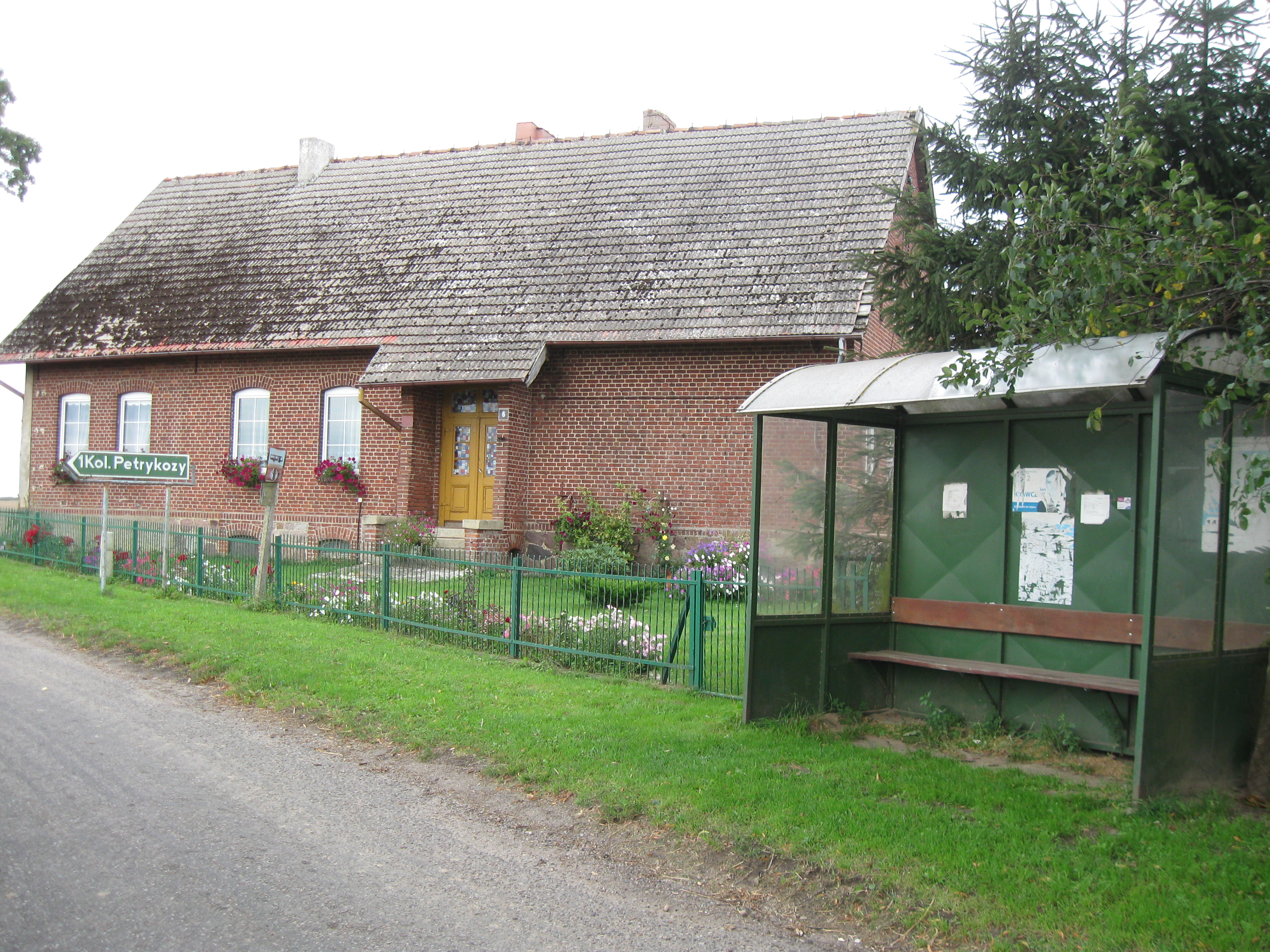 Budynek starej szkoły, przystanek Jarkowo - Szkoła i znak kierujący do kolonii Petrykozy w Jarkowie